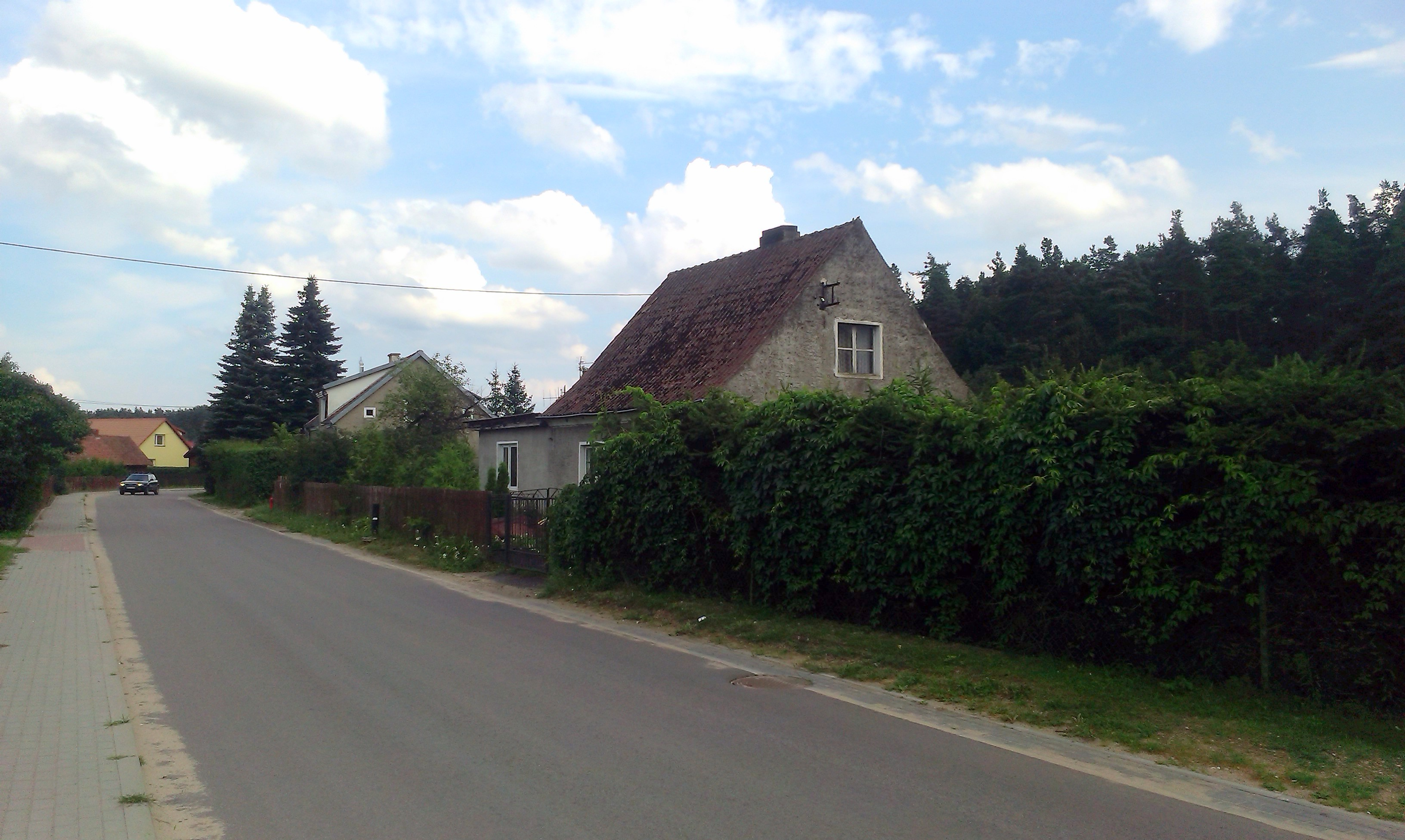 Bystrz k. Spychowa